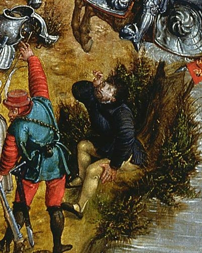 Self-portrait